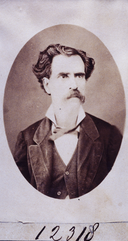 Obra que integra o acervo do Museu Paulista da USP. Coleção Militão Augusto de Azevedo.